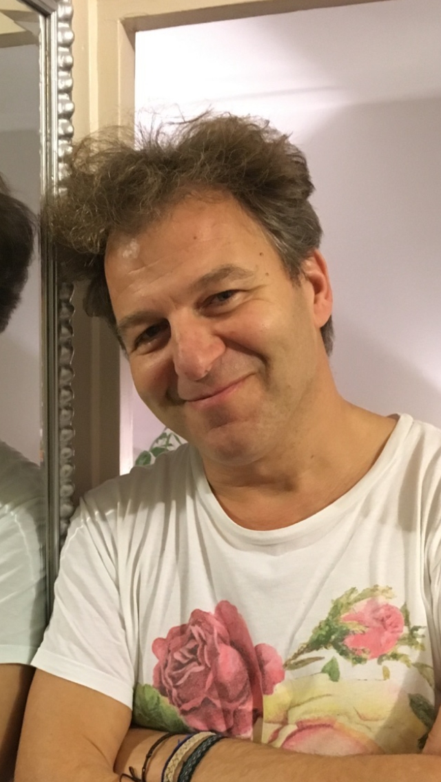 Selfi